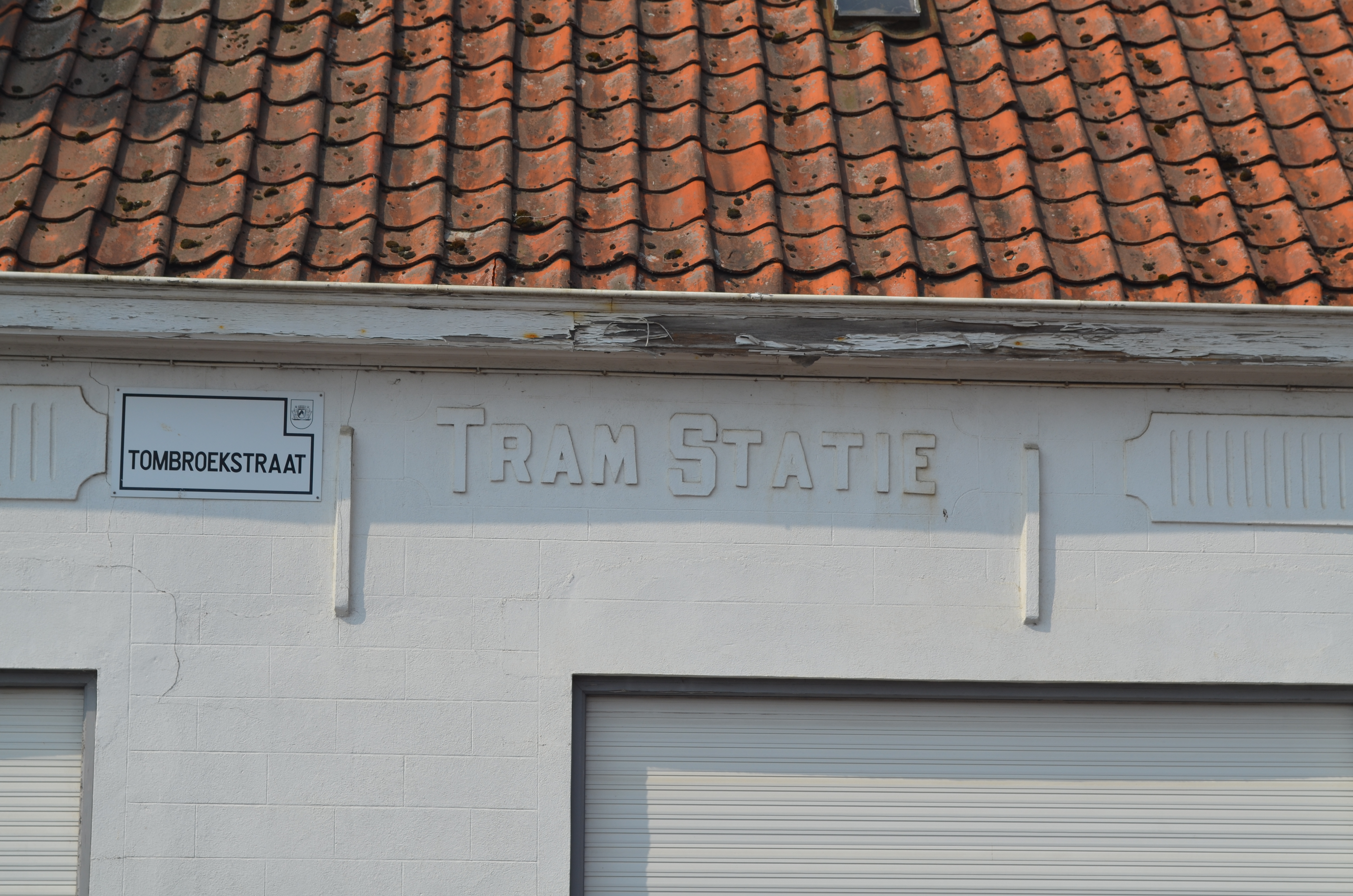 Rollegem (Kortrijk-België - gebouw van de voormalige tramhalt op de tramlijn KMx van Kortrijk naar Moeskroen.